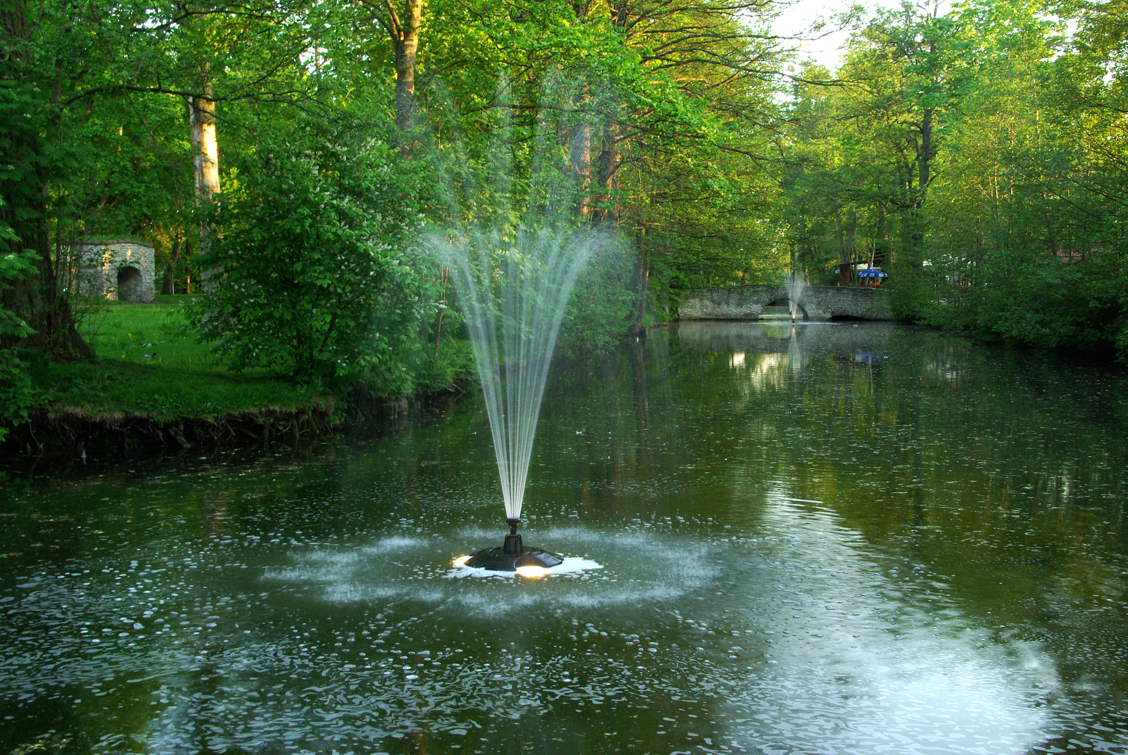 Löwenruh' park